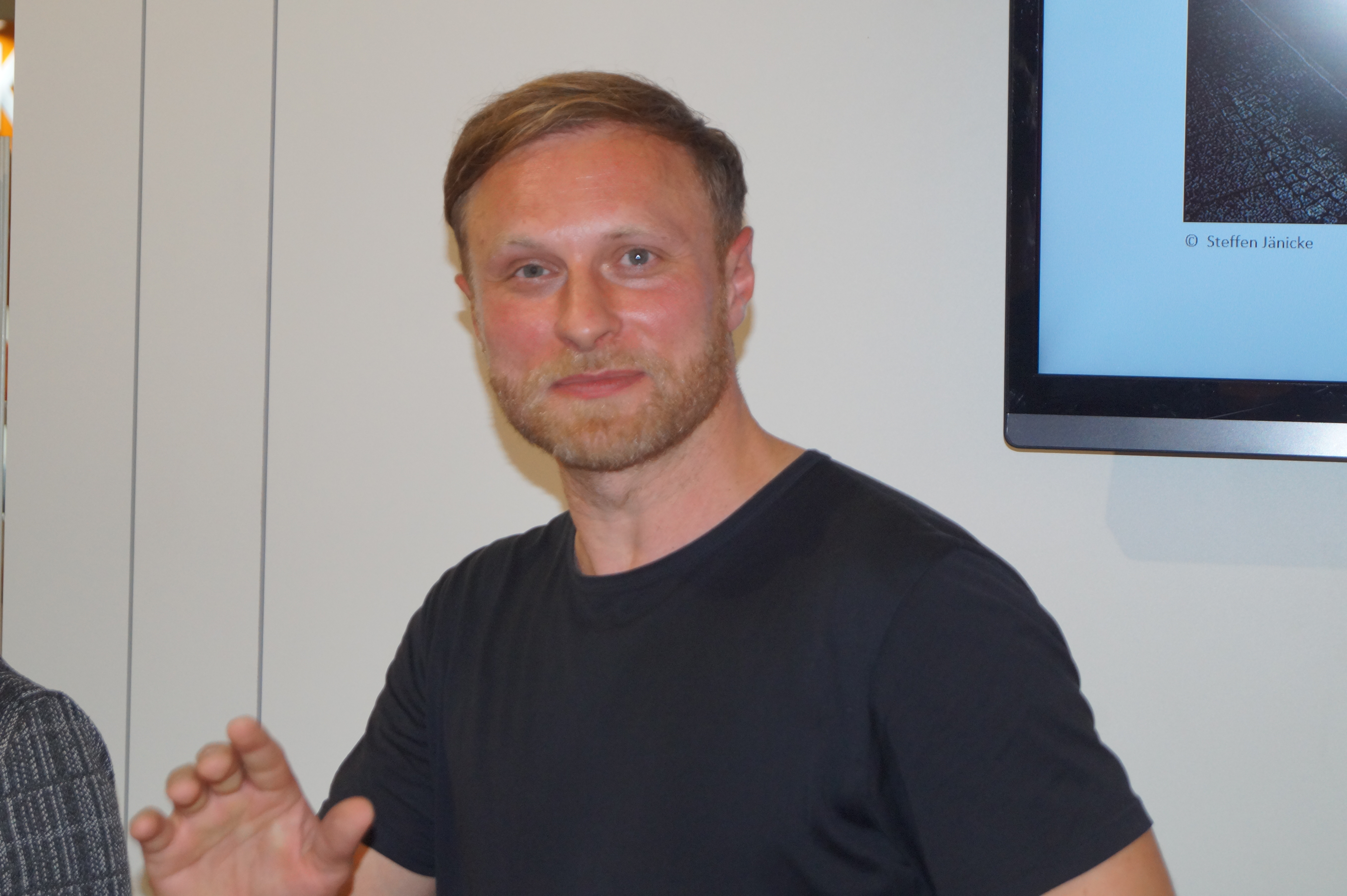 Michael Nast präsentiert 'Vom Sinn unseres Lebens und andere Missverständnisse zwischen Ost und West' auf der Frankfurter Buchmesse 2019, 01